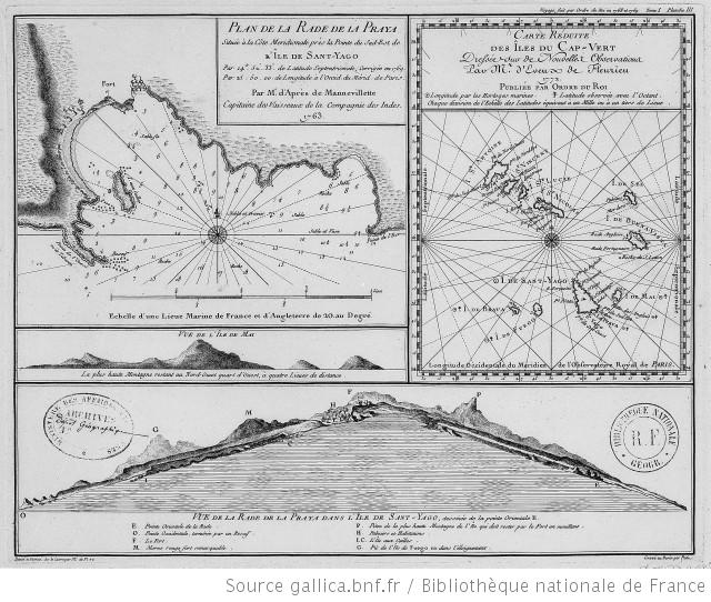 Carte réduite des îles du Cap-Vert / dressée sur de nouvelles observations par M. d'Eveux de Fleurieu